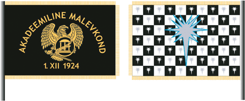 Tartu Akadeemilise malevkonna lipp